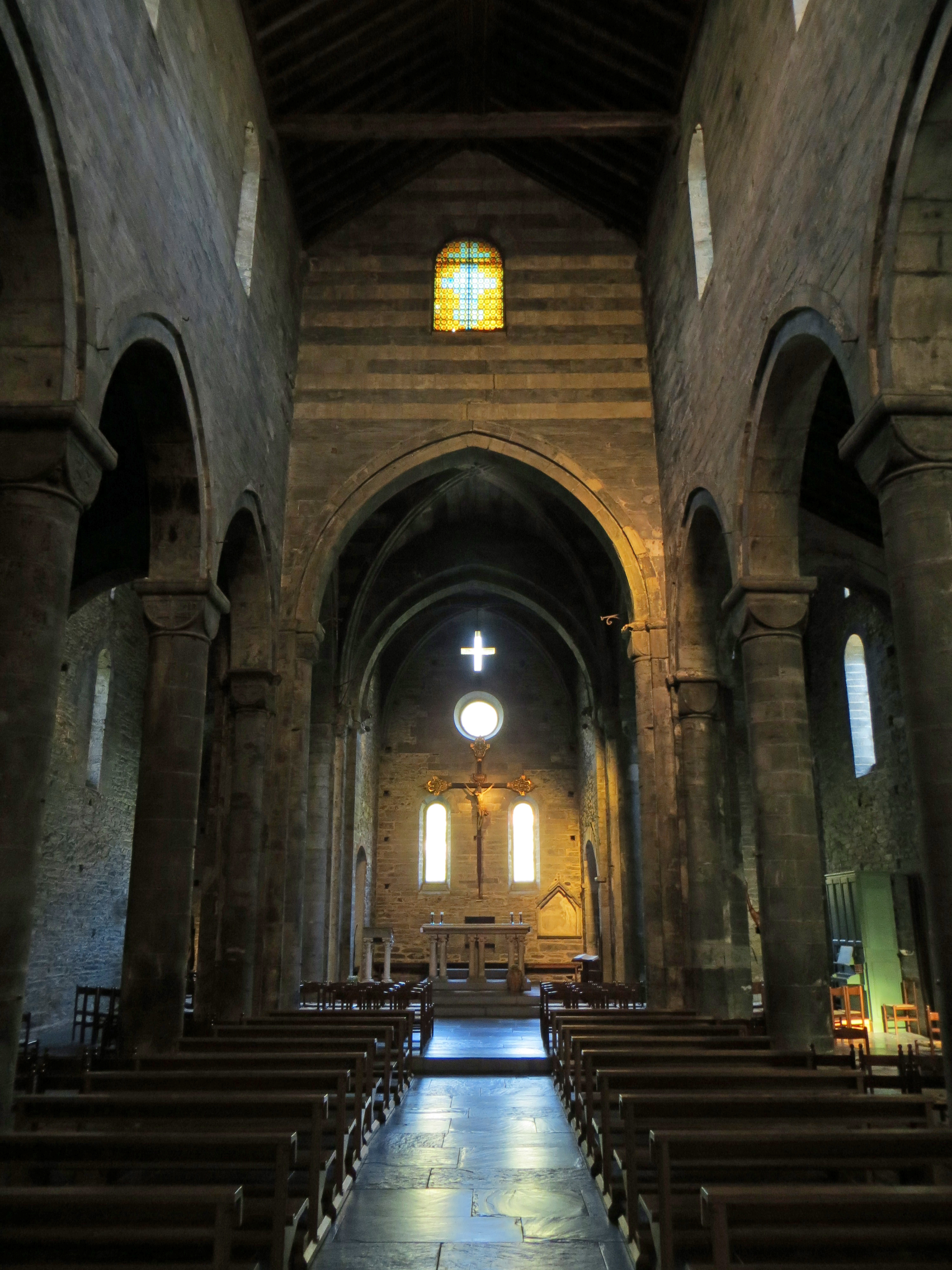 Basilica dei Fieschi (San Salvatore di Cogorno) - navata centrale